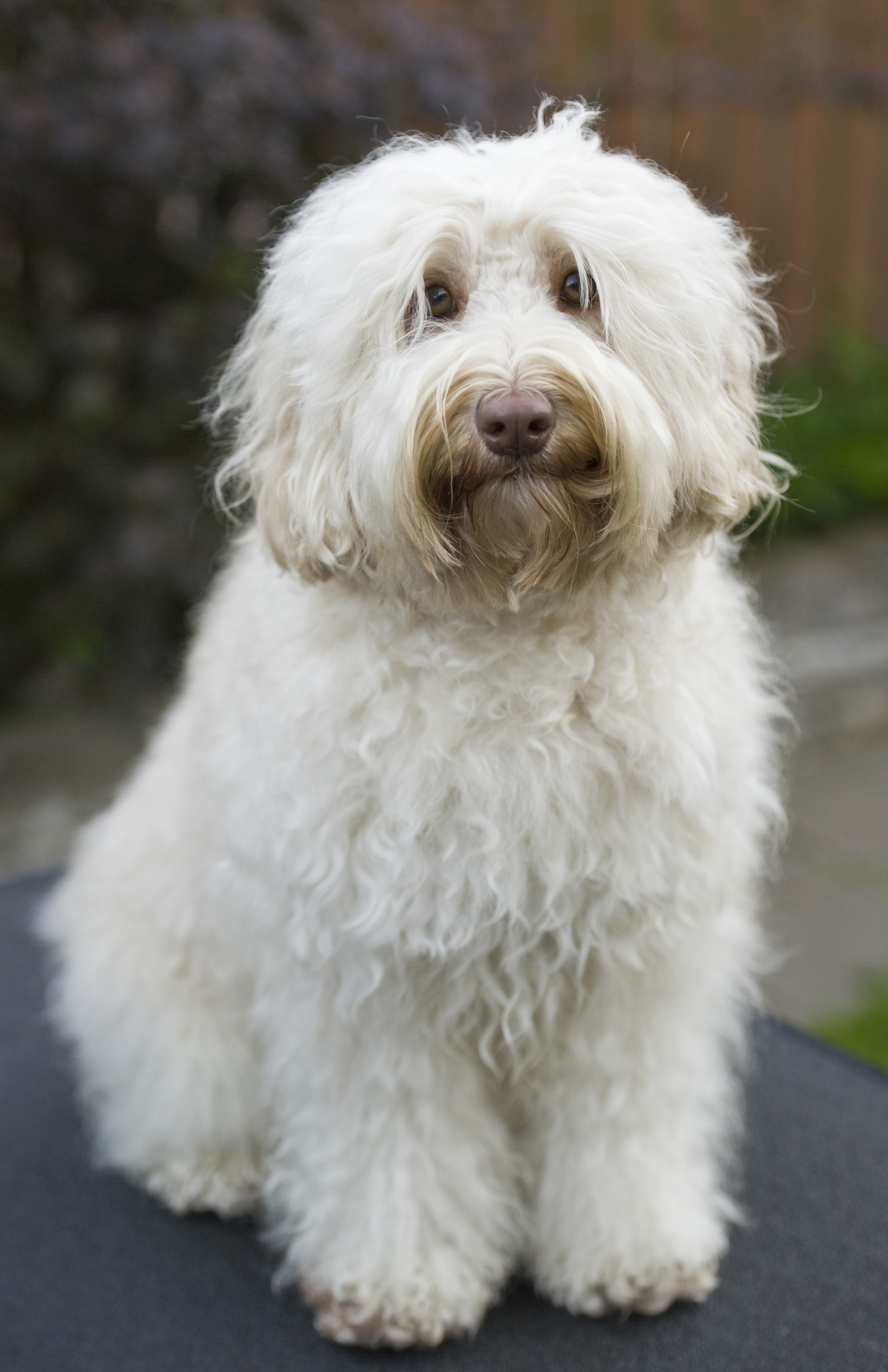 Australian Cobberdogeja on kolmen kokoisia. Mini, Medium ja Standard. Kuvassa Medium uros.